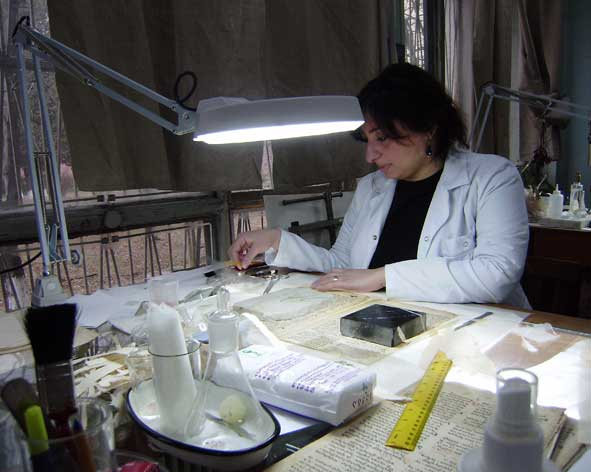 ძველნაბეჭდი წიგნის რესტავრაცია ხელნაწერთა ეროვნულ ცენტრში